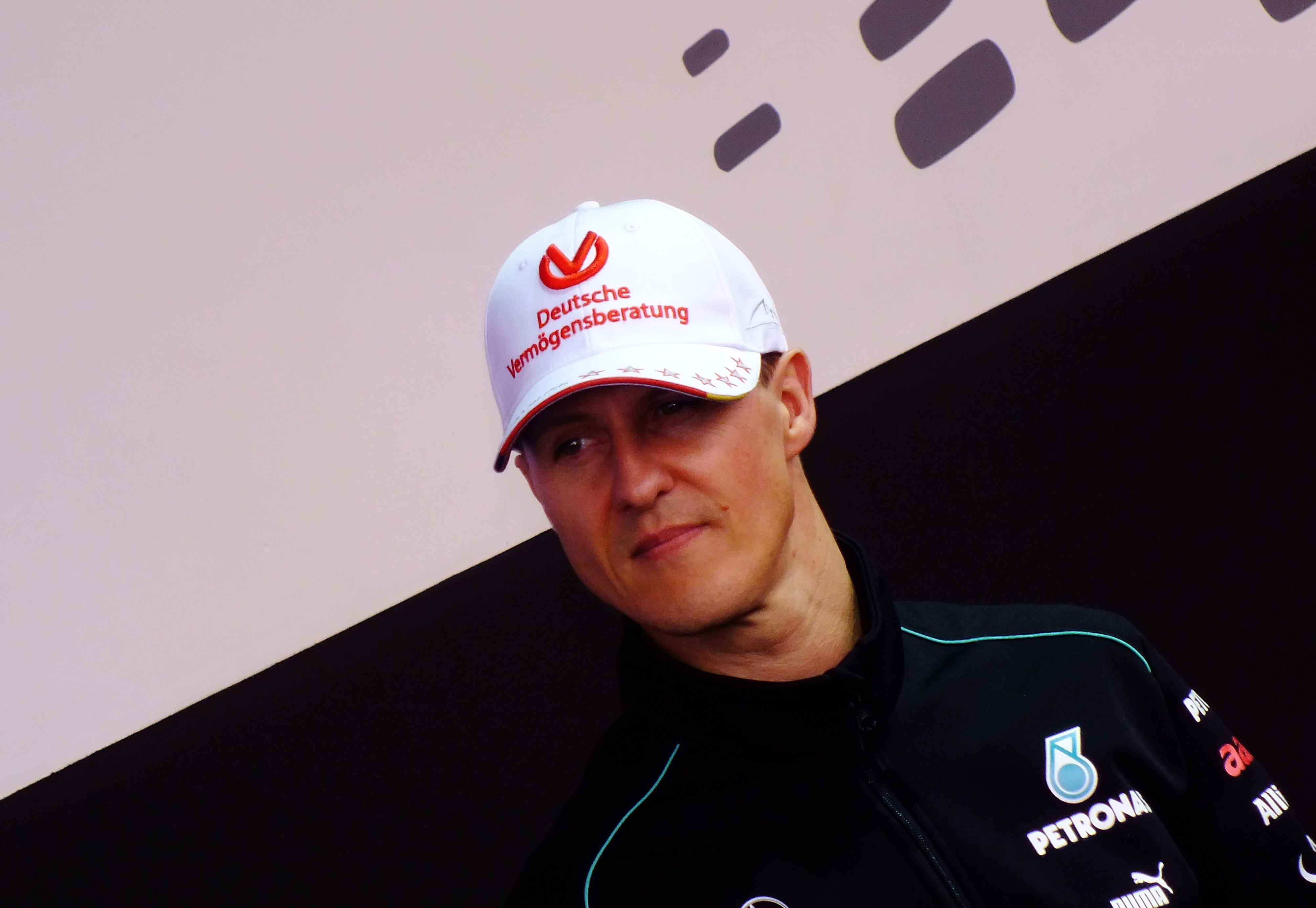 2012-4 上海国际赛车场（ F1 2012） AMG展台 宣传会